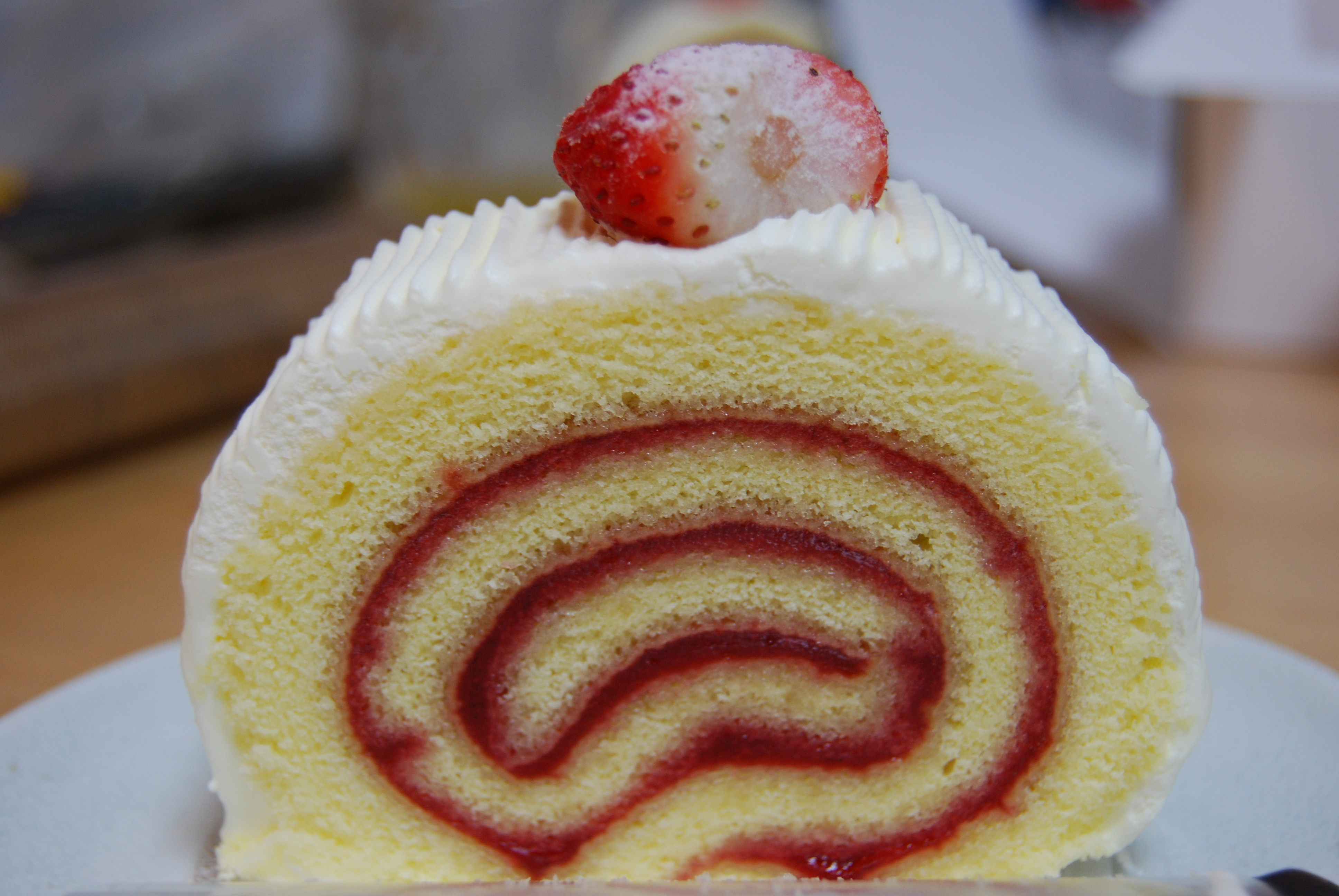 A cake roll